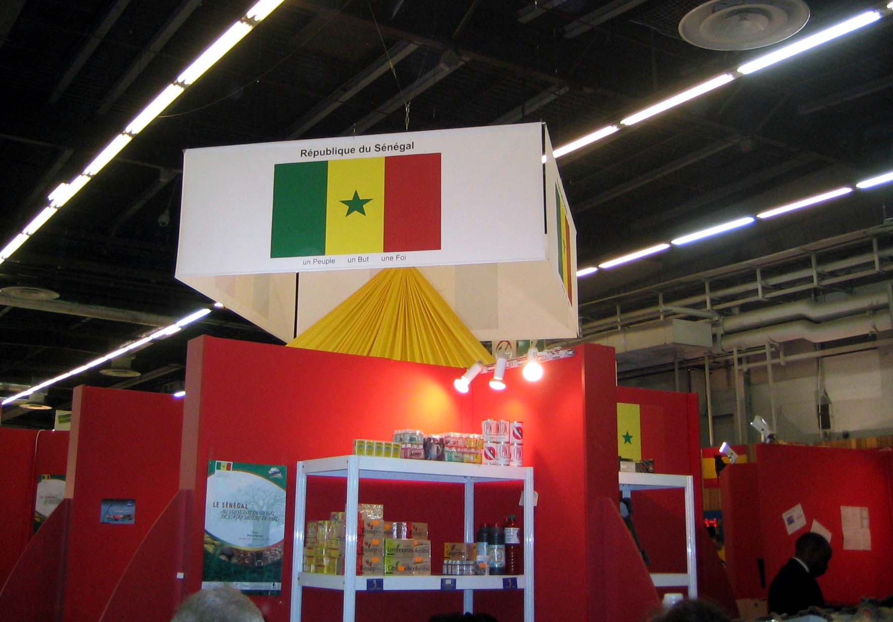 Présentation de produits sur le stand du Sénégal au Salon international de l'Agriculture à Paris (3-11 mars 2007)